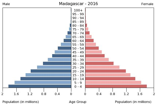 A population pyramid illustrates the age and sex structure of a country's population and may provide insights about political and social stability, as well as economic development. The population is distributed along the horizontal axis, with males shown on the left and females on the right. The male and female populations are broken down into 5-year age groups represented as horizontal bars along the vertical axis, with the youngest age groups at the bottom and the oldest at the top. The shape of the population pyramid gradually evolves over time based on fertility, mortality, and international migration trends.